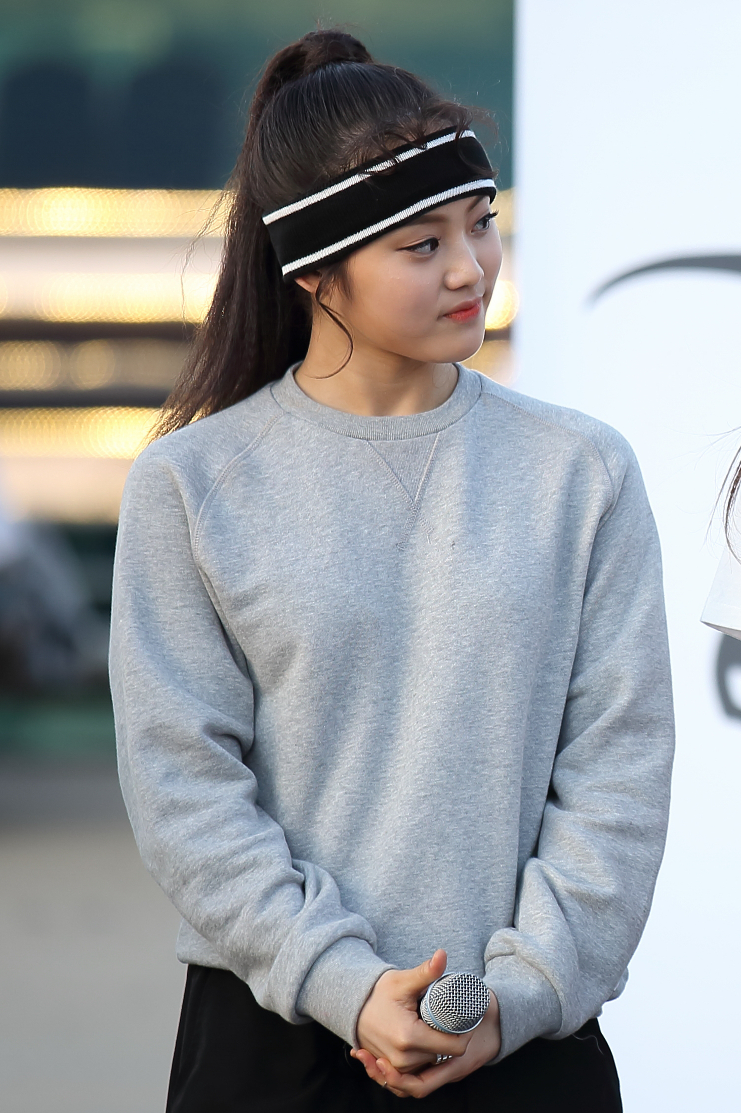 150516 여의도한강공원 버스킹 직찍